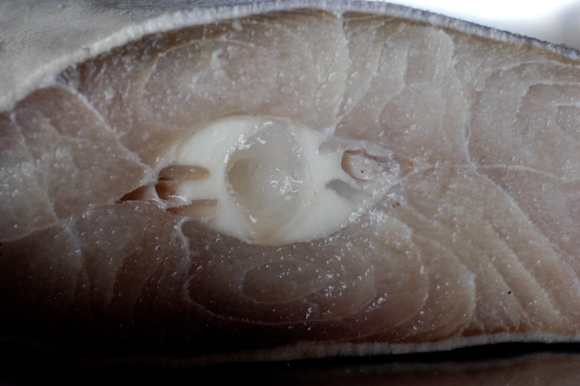 caçonete, tubarão carcarrinídeo de no máximo 2m de comprimento preparado para o consumo humano